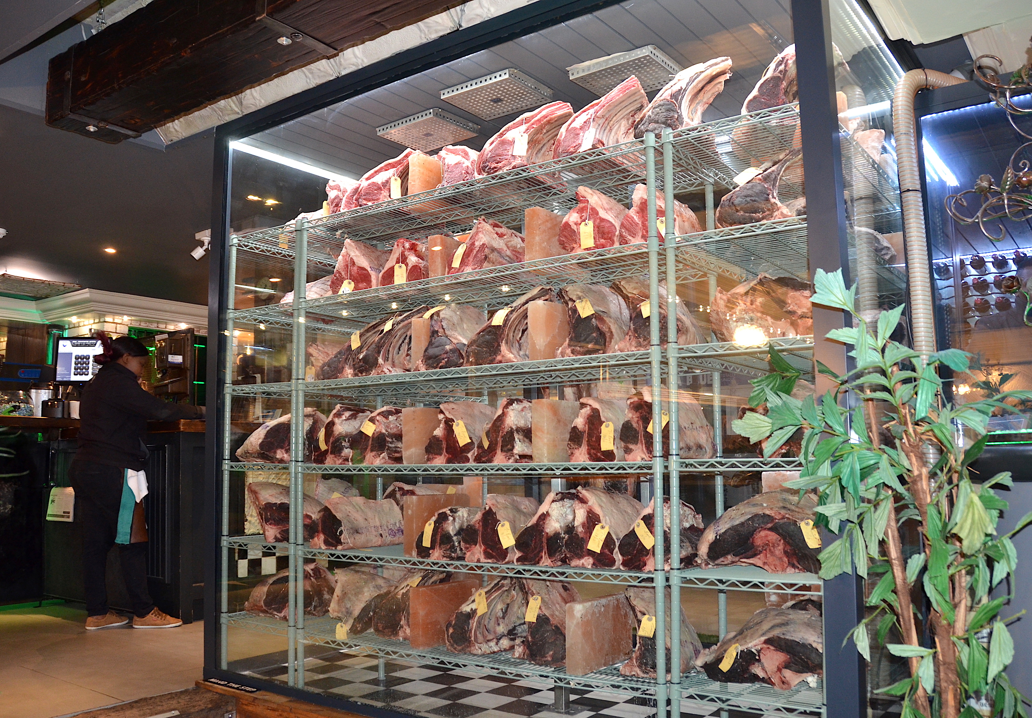 Kühlregal für Steaks zur Wahl in einem Steakhouse in Hermanus (Südafrika)